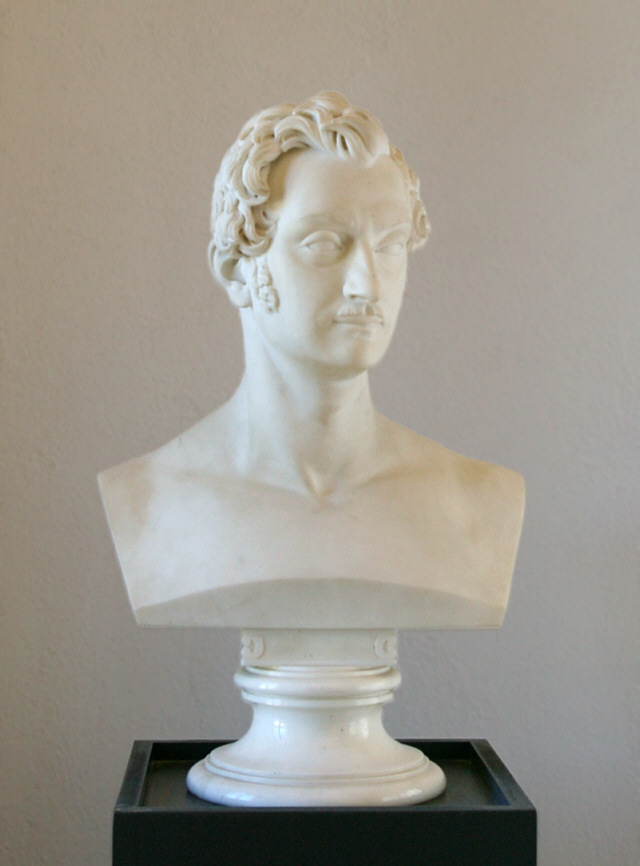 Wilhelm Malte I., Fürst zu Putbus. Marmorbüste im Jagdschloß Granitz (Rügen)